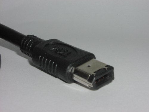 (c) 2004 Wim van 't Einde Vaassen